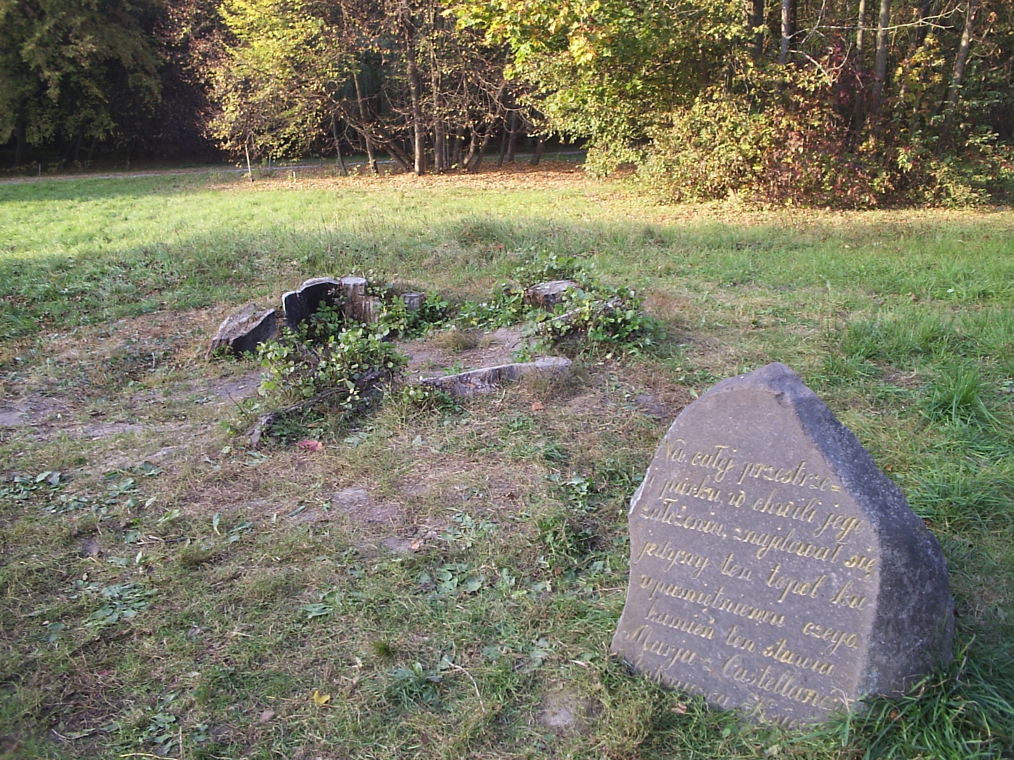 Помнік М. дэ Кастэлян у Нясвіжскім парку